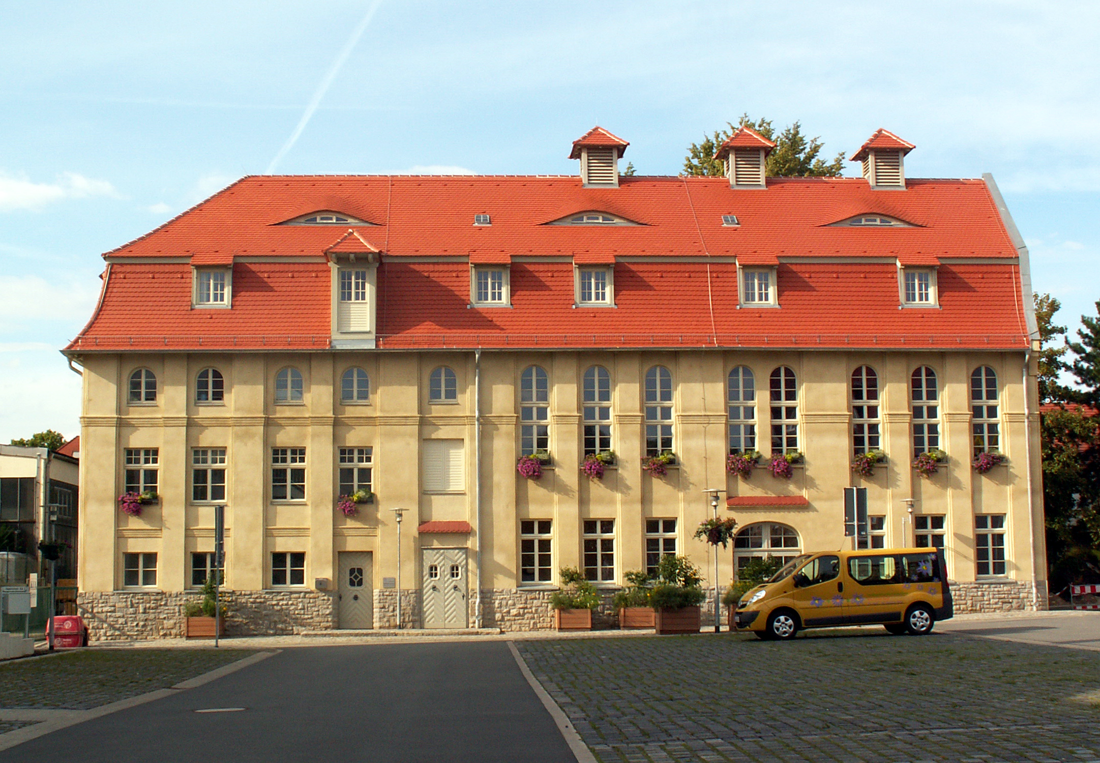 Geschäftsstelle der LAGA Aschersleben im Gebäude Heinrichstraße 4